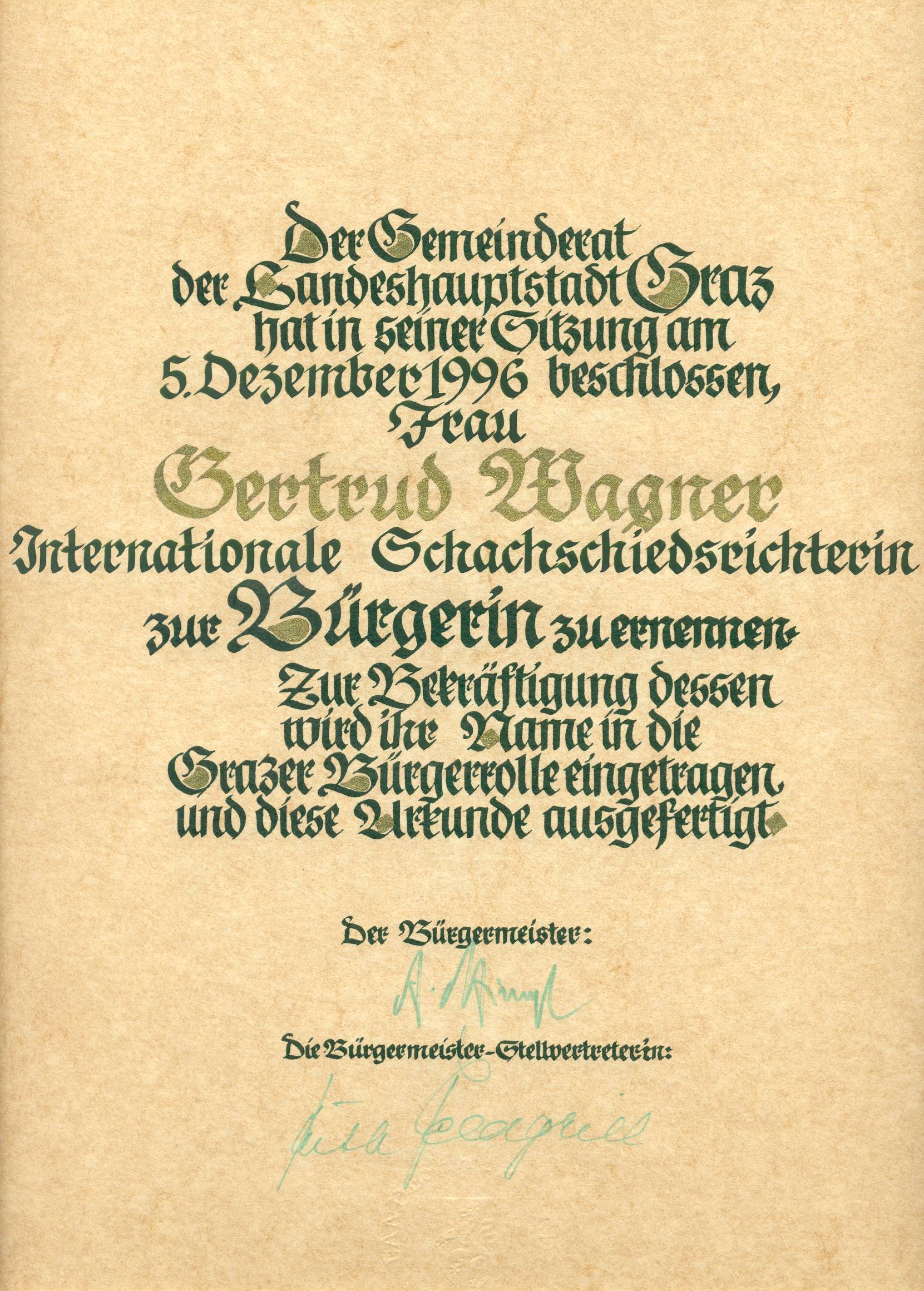 Ernennung zur Bürgerin der Stadt Graz am 5. Dezember 1996, Urkunde gezeichnet von "Der Bürgermeister".